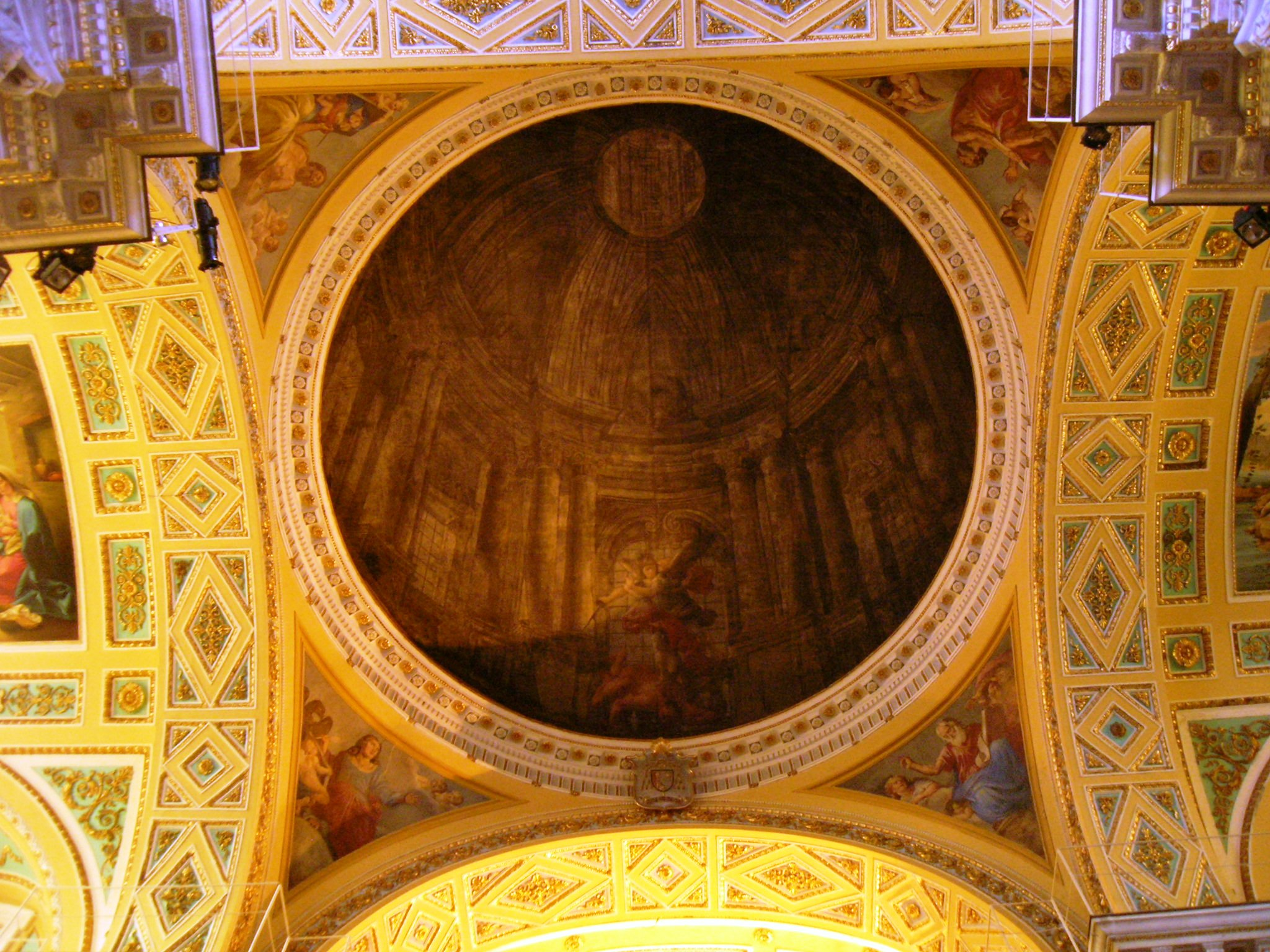 La basilica di San Michele Arcangelo a Piano di Sorrento